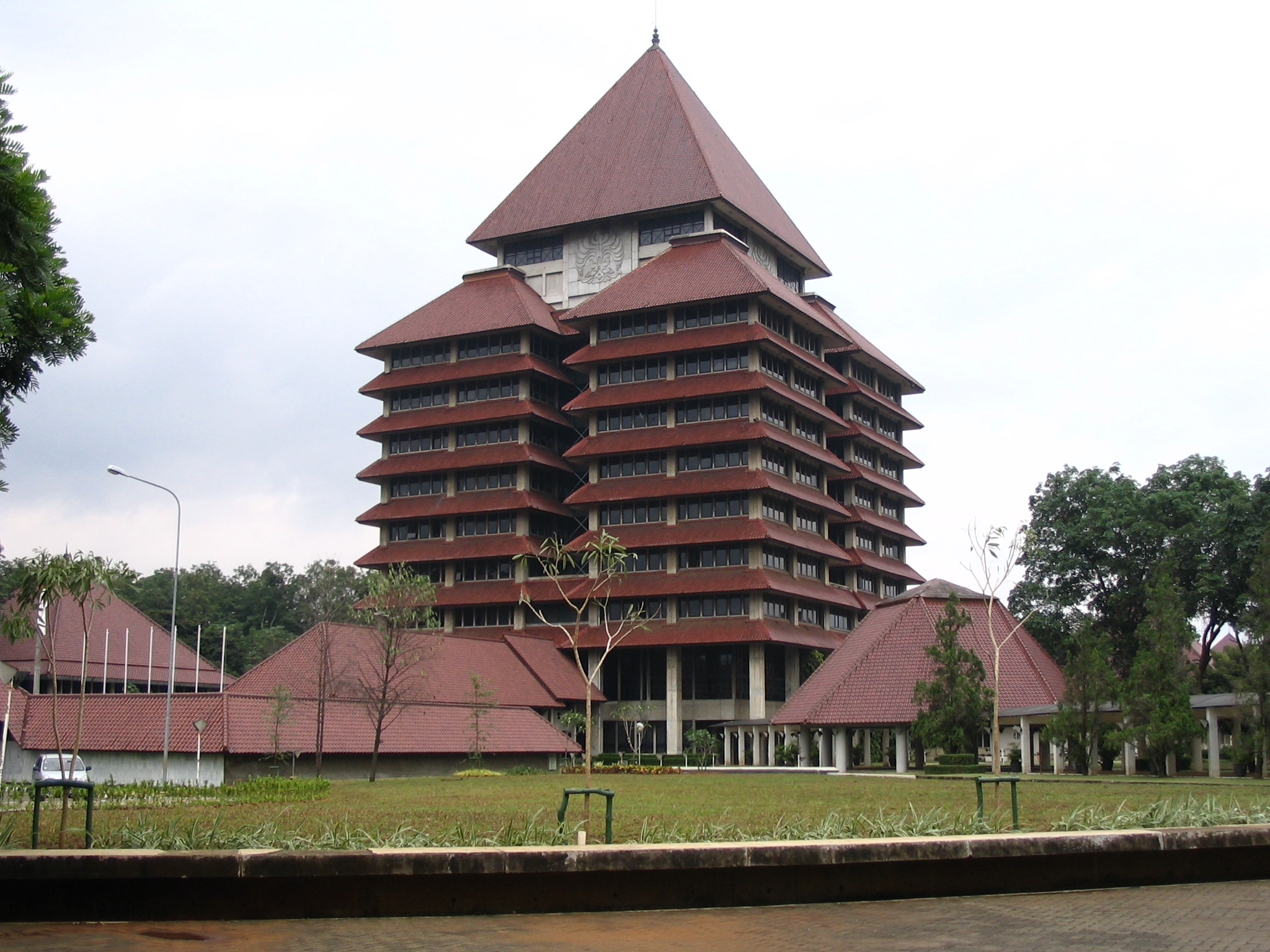 Universidad de Indonesia, edificio administrativo, Campus de Depok, Gran Yakarta.